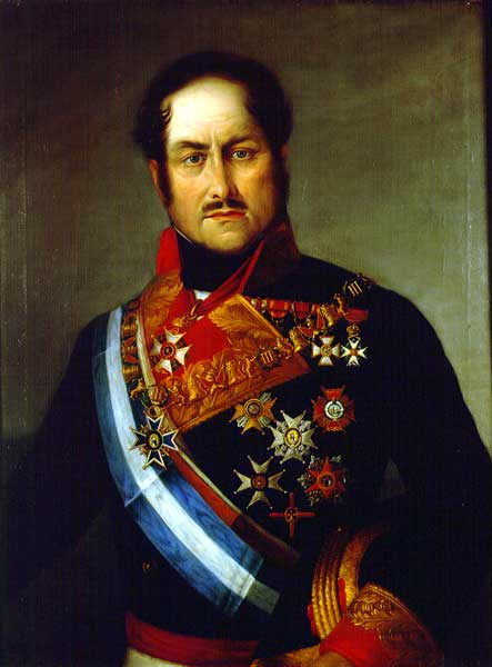 Retrato del aristócrata y militar Juan Van Halen y Sartí (1788-1864), que fue alférez de navío de la Real Armada Española, mariscal de campo del ejército español, mayor de caballería del ejército imperial ruso y teniente general del ejército belga. El retratado aparece de frente, vistiendo el uniforme grande de mariscal de campo español, y con el collar de la Orden de Carlos III y la encomienda de la Orden de Leopoldo I de Bélgica, así como las bandas y placas de las grandes cruces de las órdenes de Carlos III, Isabel la Católica y San Hermenegildo, las cruces de primera y tercera clase de la Orden de San Fernando por servicios distinguidos, la placa de Hierro a los defensores de Bruselas, y el pasador de caballero de la orden de Leopoldo I, junto con la cruz sencilla de San Hermenegildo y otras. El retrato fue donado al Museo Naval de Madrid por el propio Juan Van Halen alrededor de 1853.